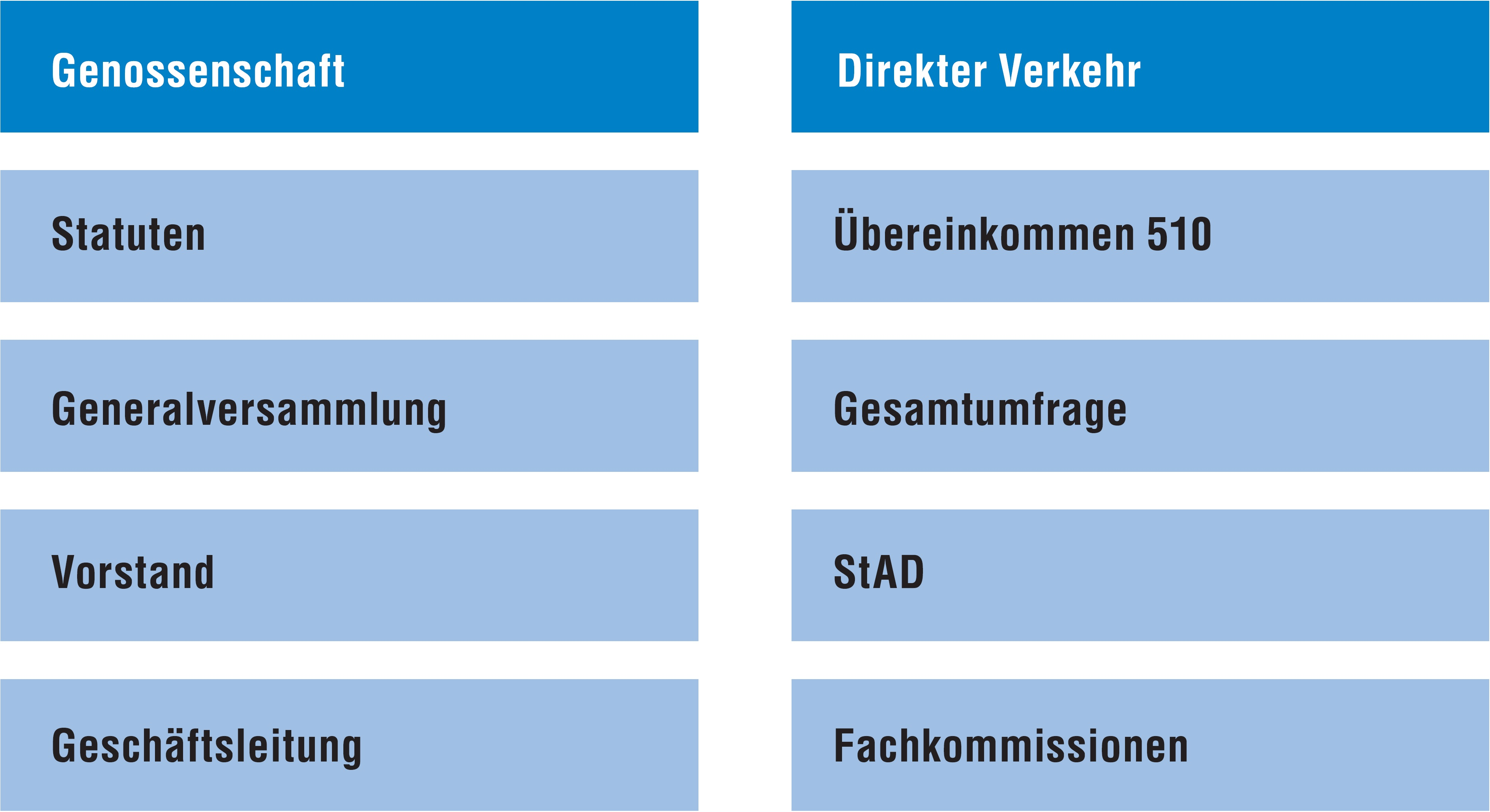 Der DV ist ähnlich einer Genossenschaft aufgebaut